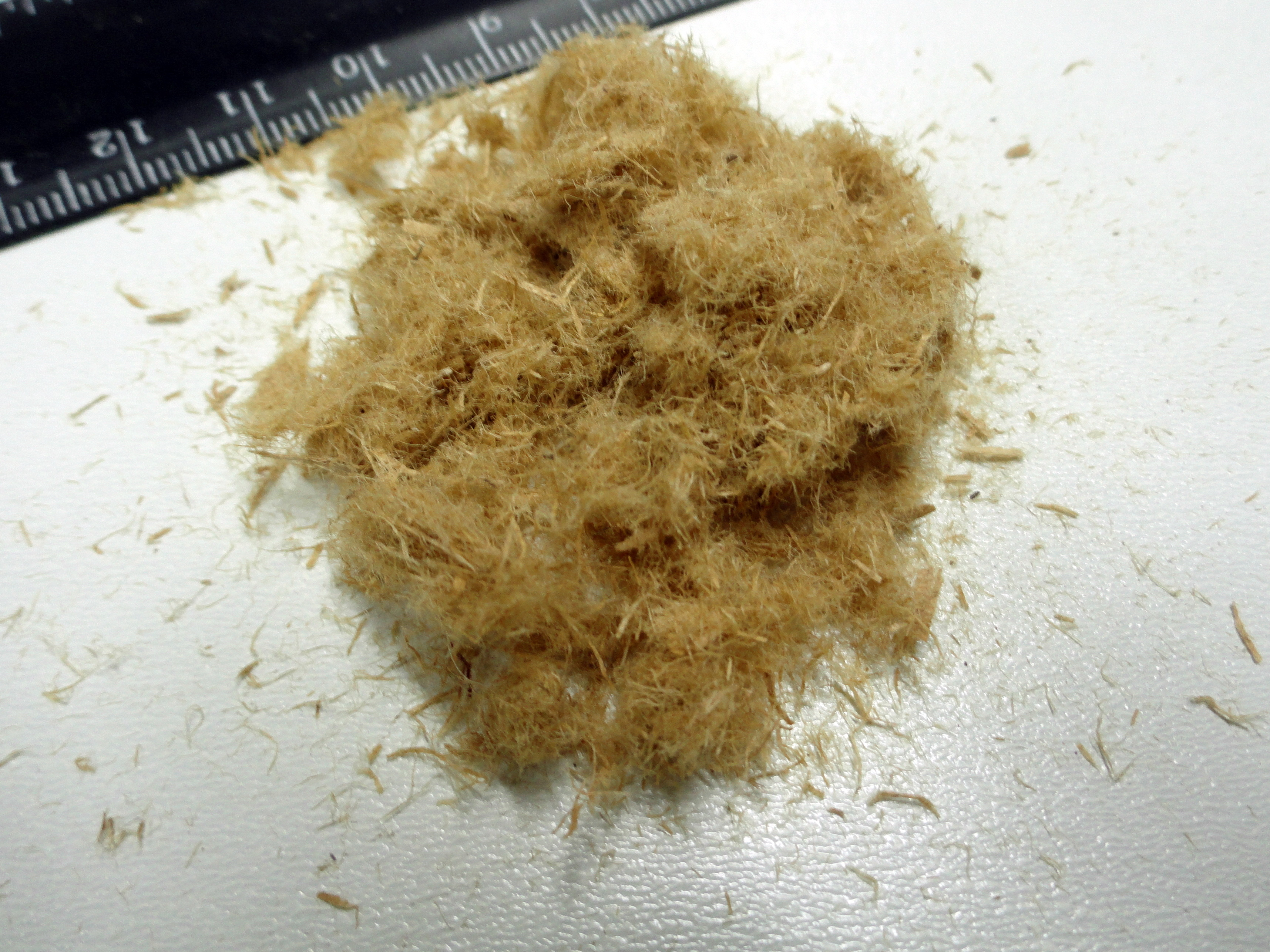 Wood fibre